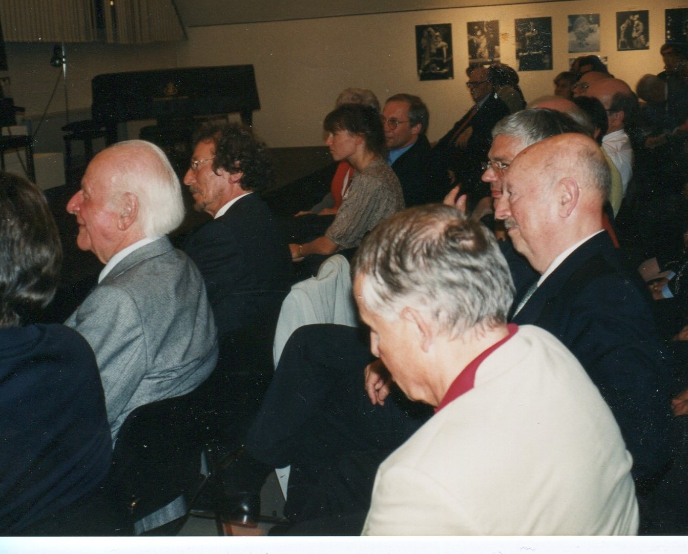 Rolf Liebermann, Armin Sandig, Gyula Trebitsch und Knut Nevermann als Gäste bei der Eröffnung einer Fotoausstellung von Fritz Peyer in der Hamburgischen Staatsoper